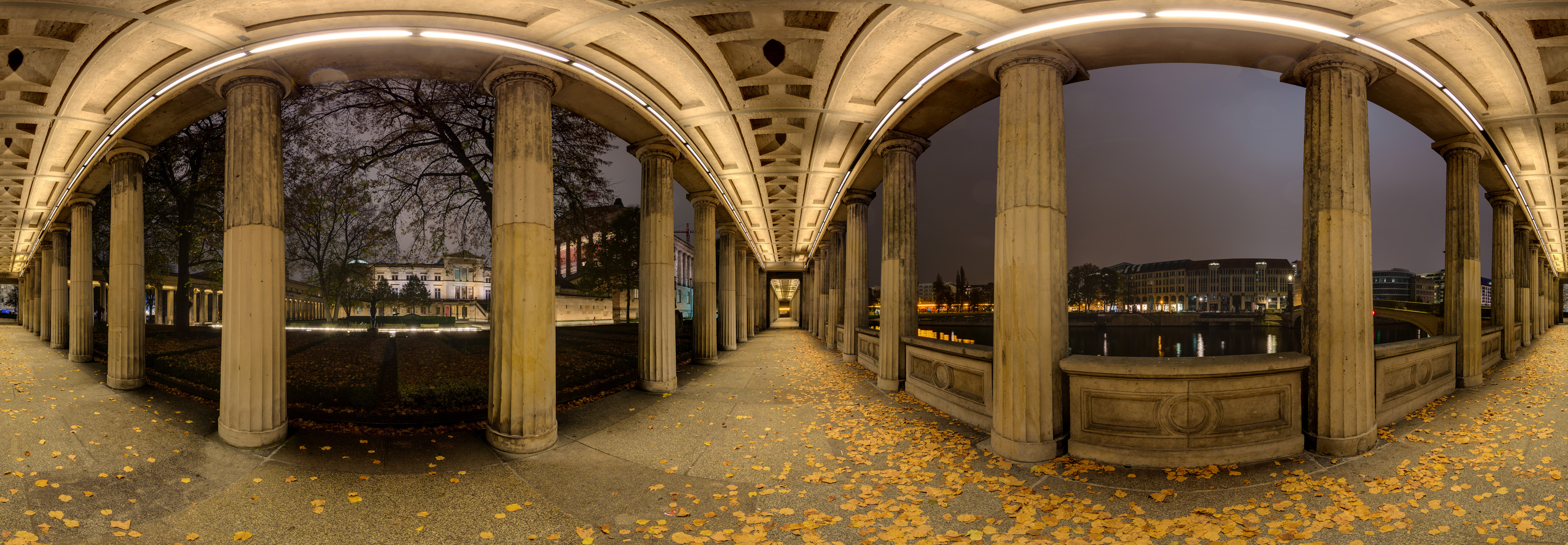 Kolonnadengang, Museumsinsel, Berlin, bei Nacht, Panorama 360 Grad, HDR